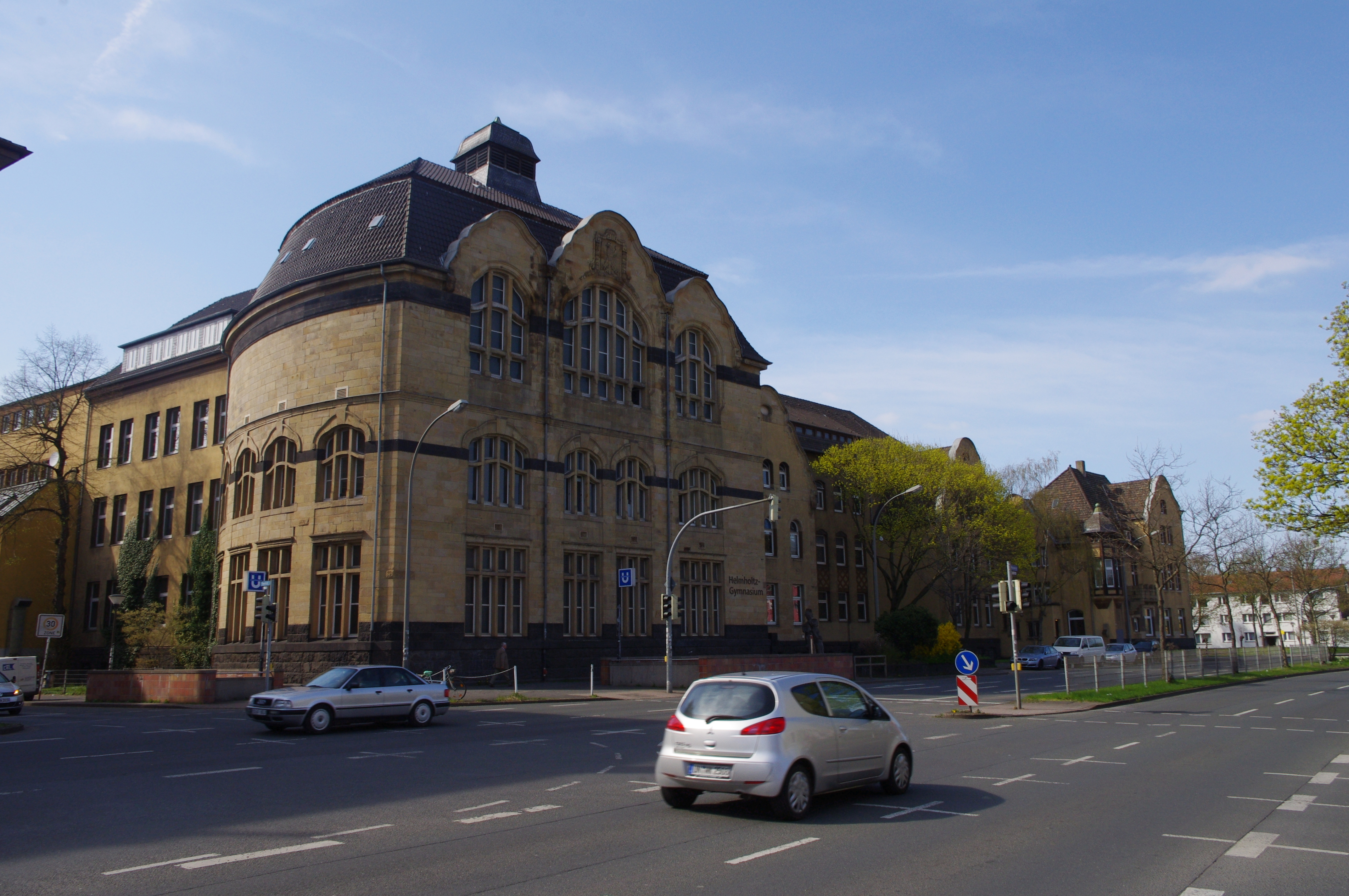 Das Helmholtz-Gymnasium, Baudenkmal Nr. A 0297 This is a photograph of an architectural monument. 0297